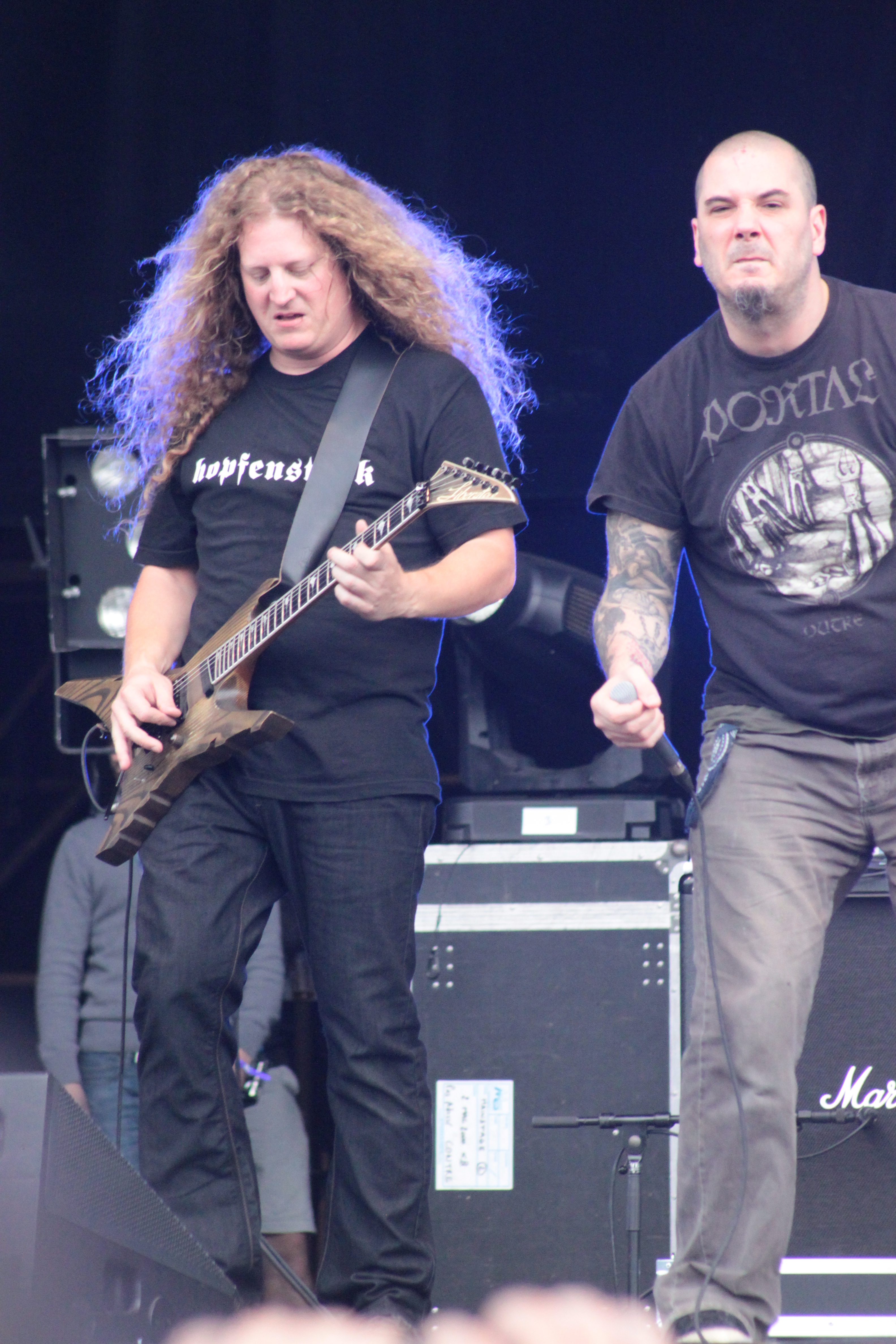 Daniel Mongrain, Phil Anselmo (guest), Voivod, Hellfest 2013, Fr-44-Clisson.